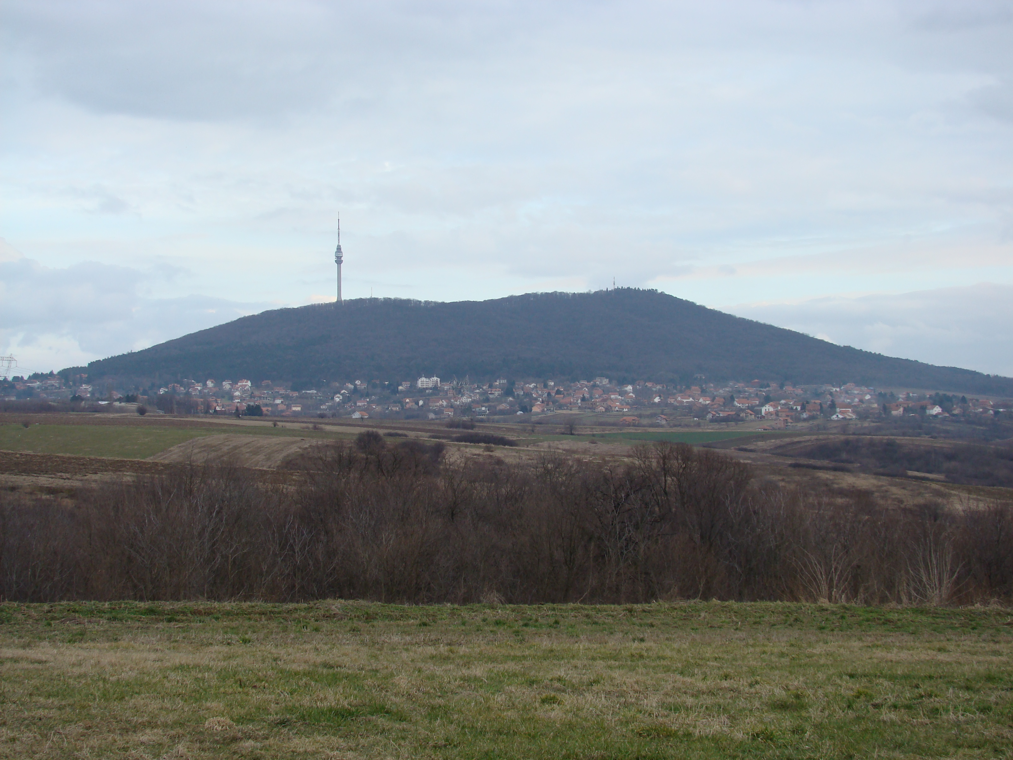 Планина Авала 2015-02-23